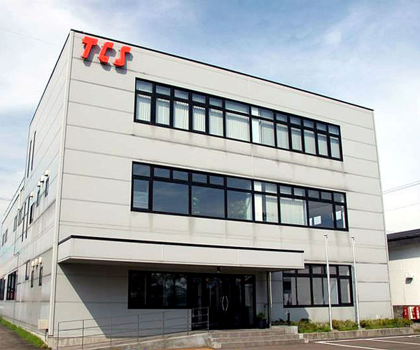 東光コンピュータサービス株式会社本社社屋